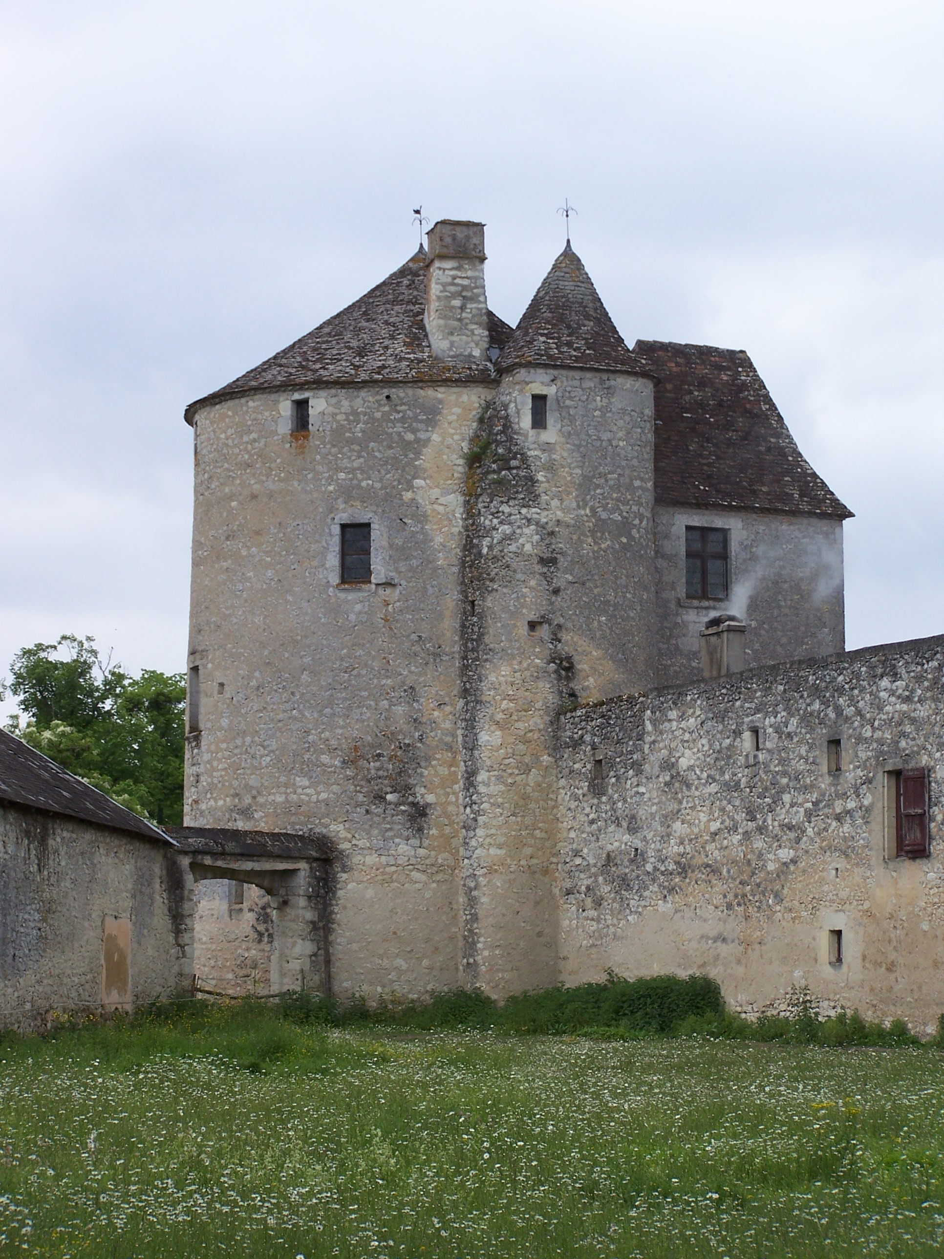 Tour de Montaigne à Saint-Michel-de-Montaigne, Dordogne, France